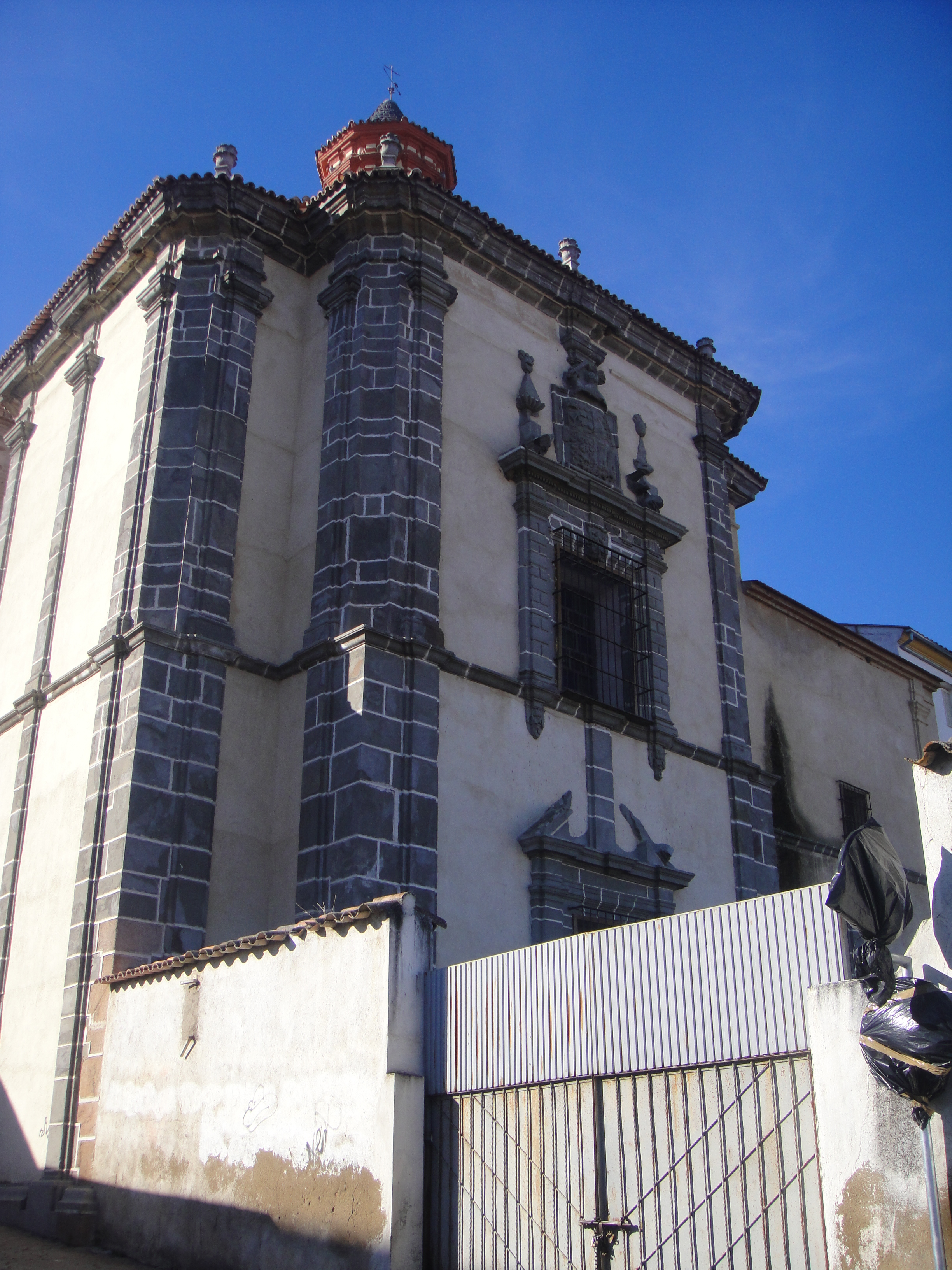 Exterior de la iglesia de San Francisco de Fuente Obejuna, provincia de Córdoba, (España).